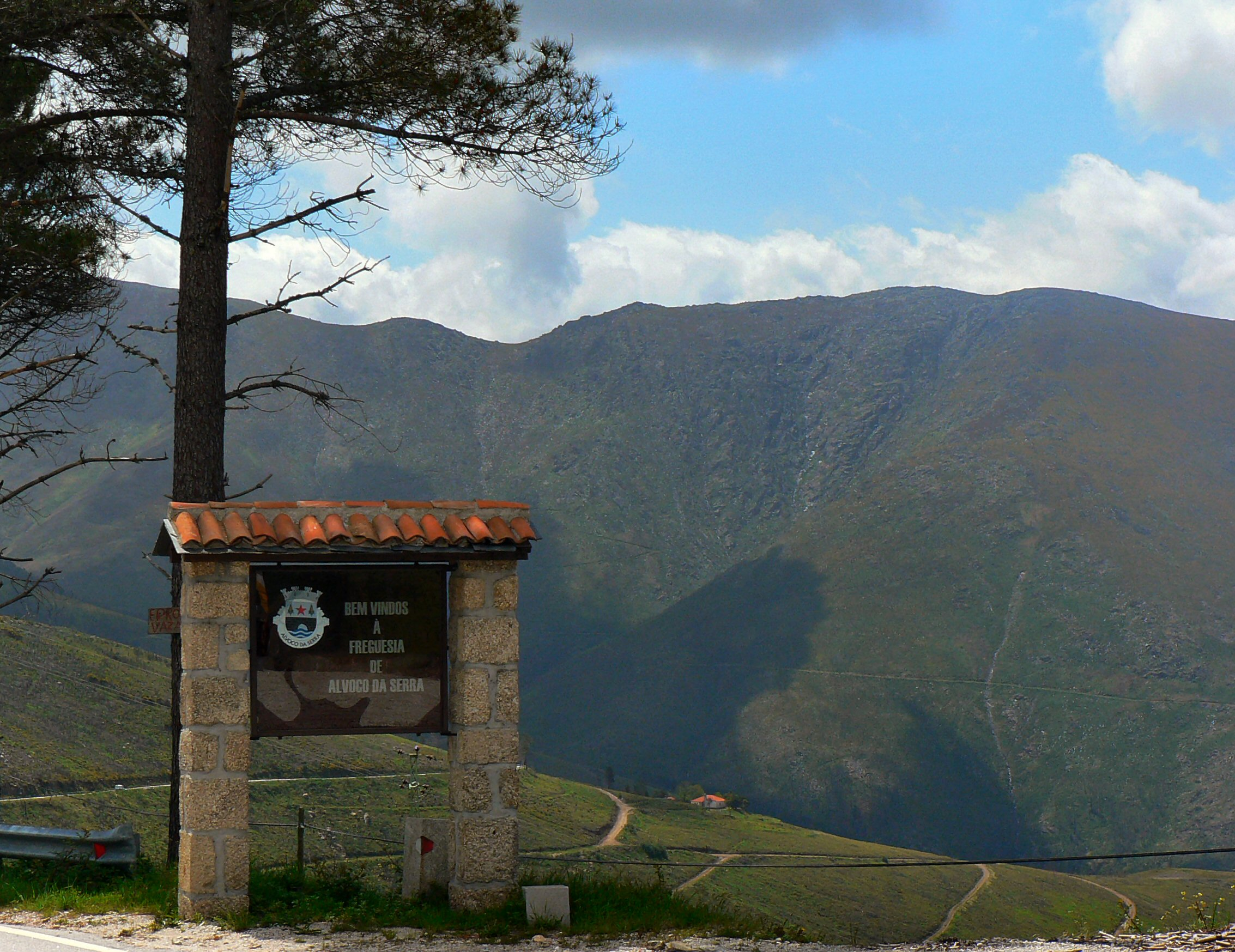 Alvoco da Serra - Vista